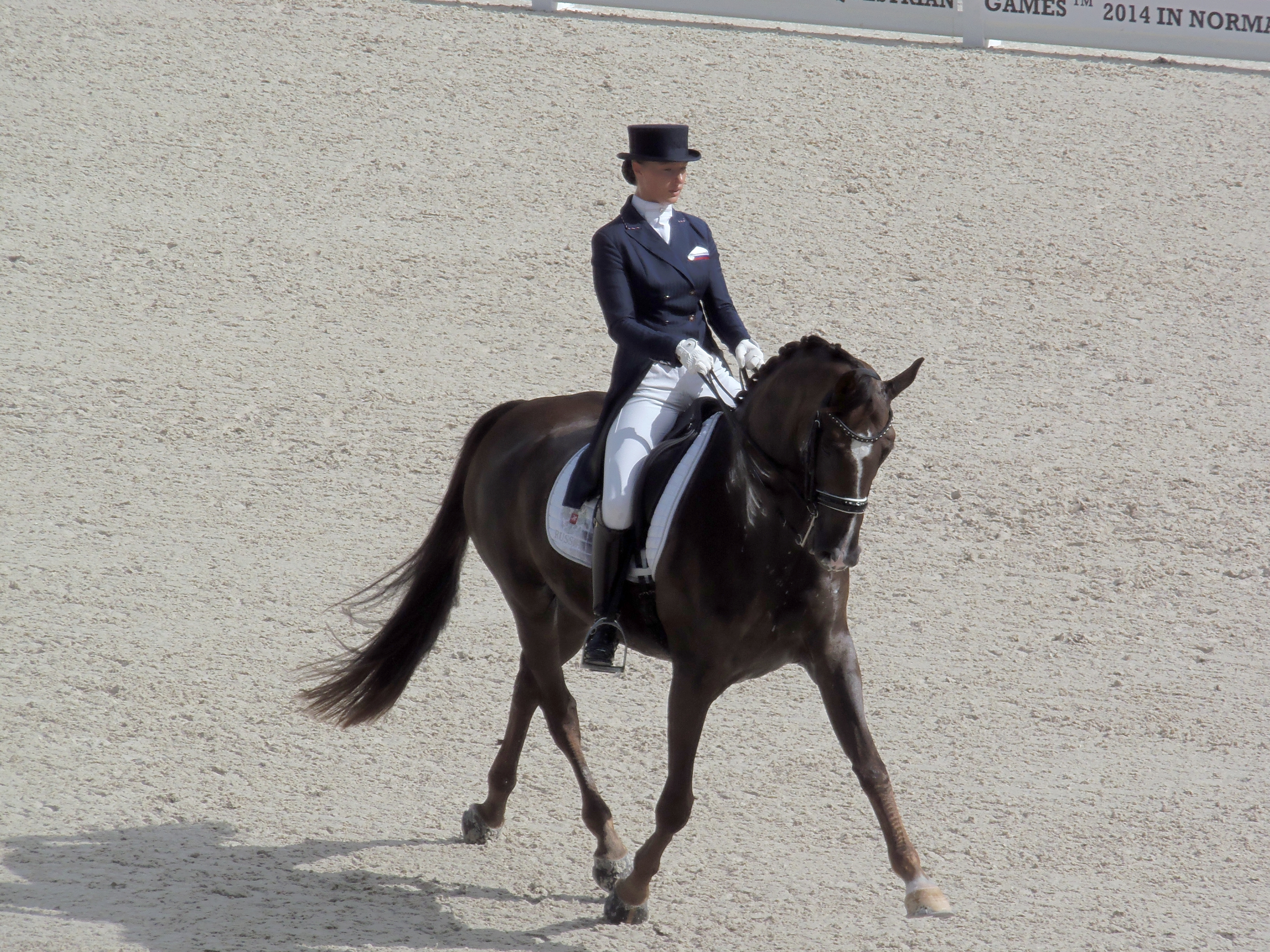 Marina Aframeeva en selle sur Vosk lors des Jeux équestres mondiaux, le 26 août 2014 au stade d'Ornano à Caen (Normandie, France).